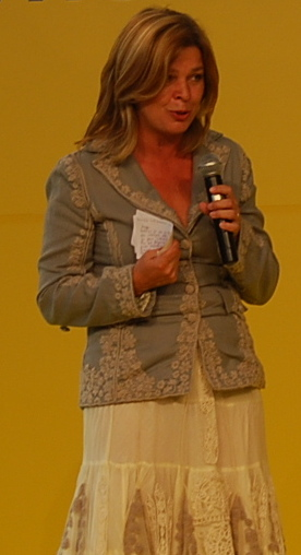 Karin Resetarits beim Wahlauftakt des Liberalen Forums zur Nationalratswahl 2008